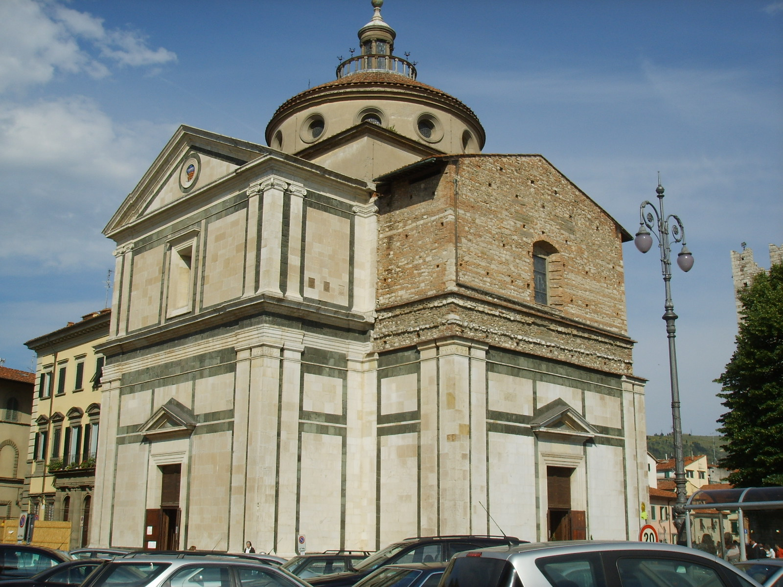 Santa Maria delle Carceri, outside view, Prato, Italy